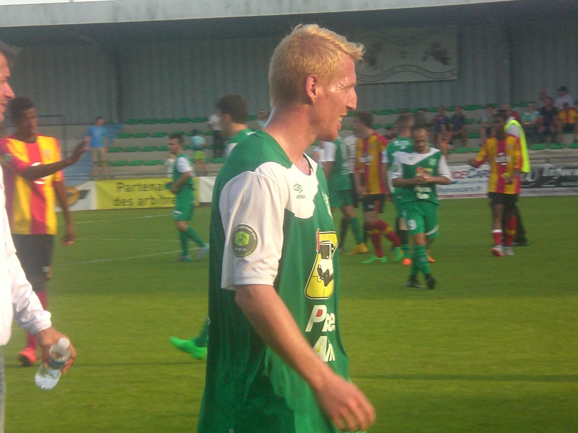 Samuel Robail lors du match RC Lens B / IC Croix, comptant pour la troisième journée du Championnat de France de football amateur (CFA), le 29 août 2015, au Stade François Blin d'Avion.